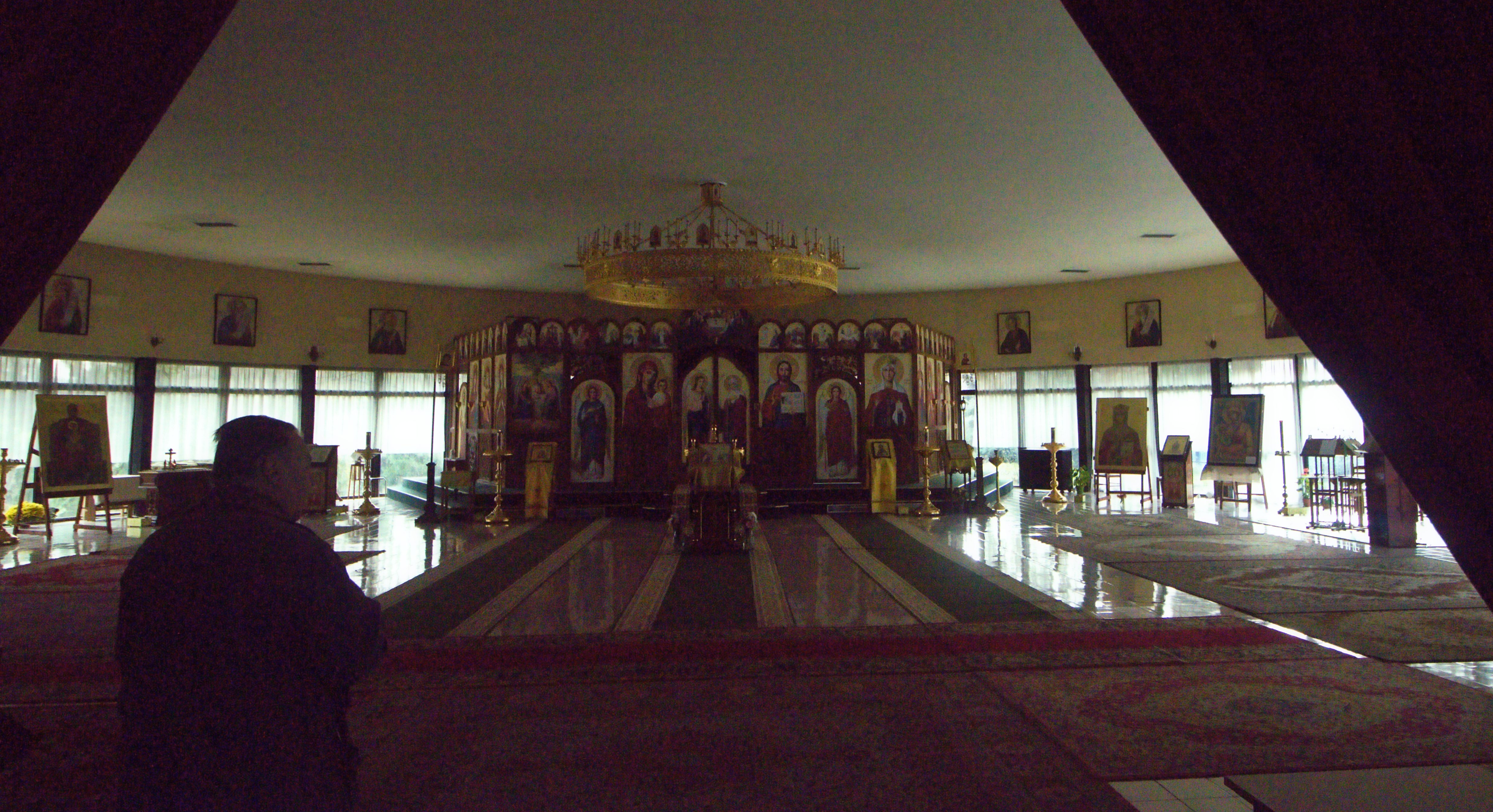 Praha 6-Bubeneč, pravoslavný chrám sv. Ludmily